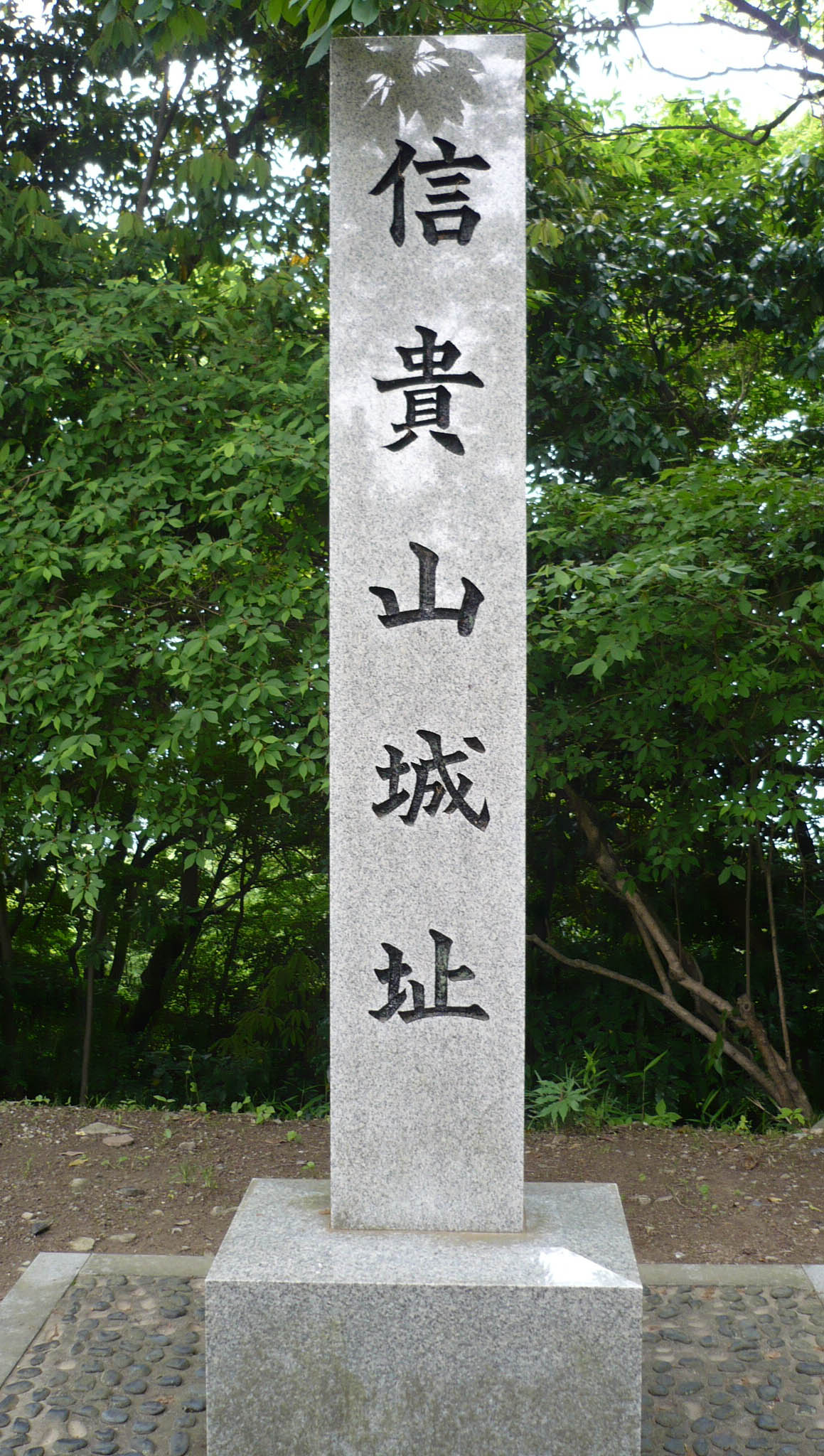 信貴山城の石碑